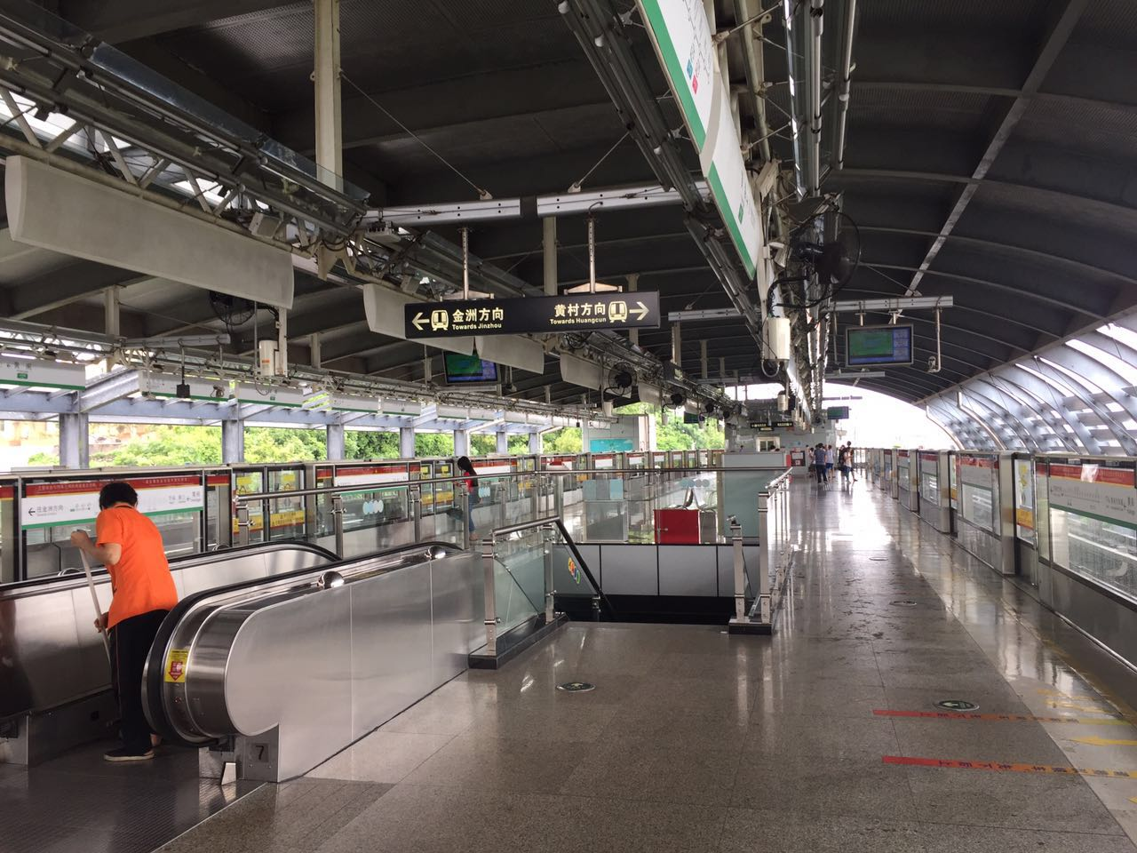 广州地铁黄阁站